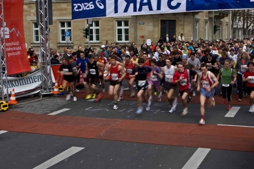 Der Würzburger Residenzlauf 2008 (Start des Laufes Fit & Fun).